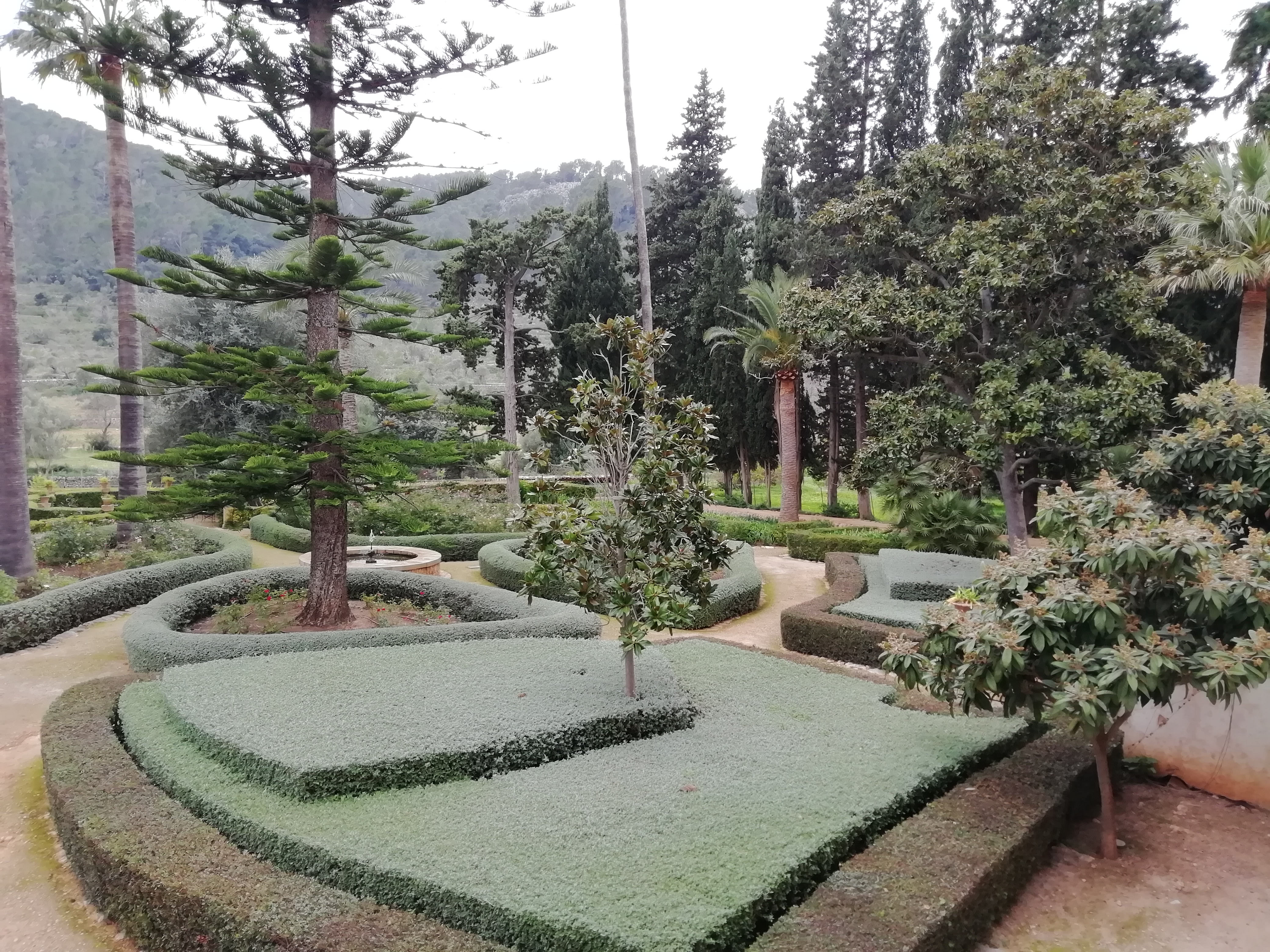 jardines de la finca mallorquina Raixa, en Buñola.